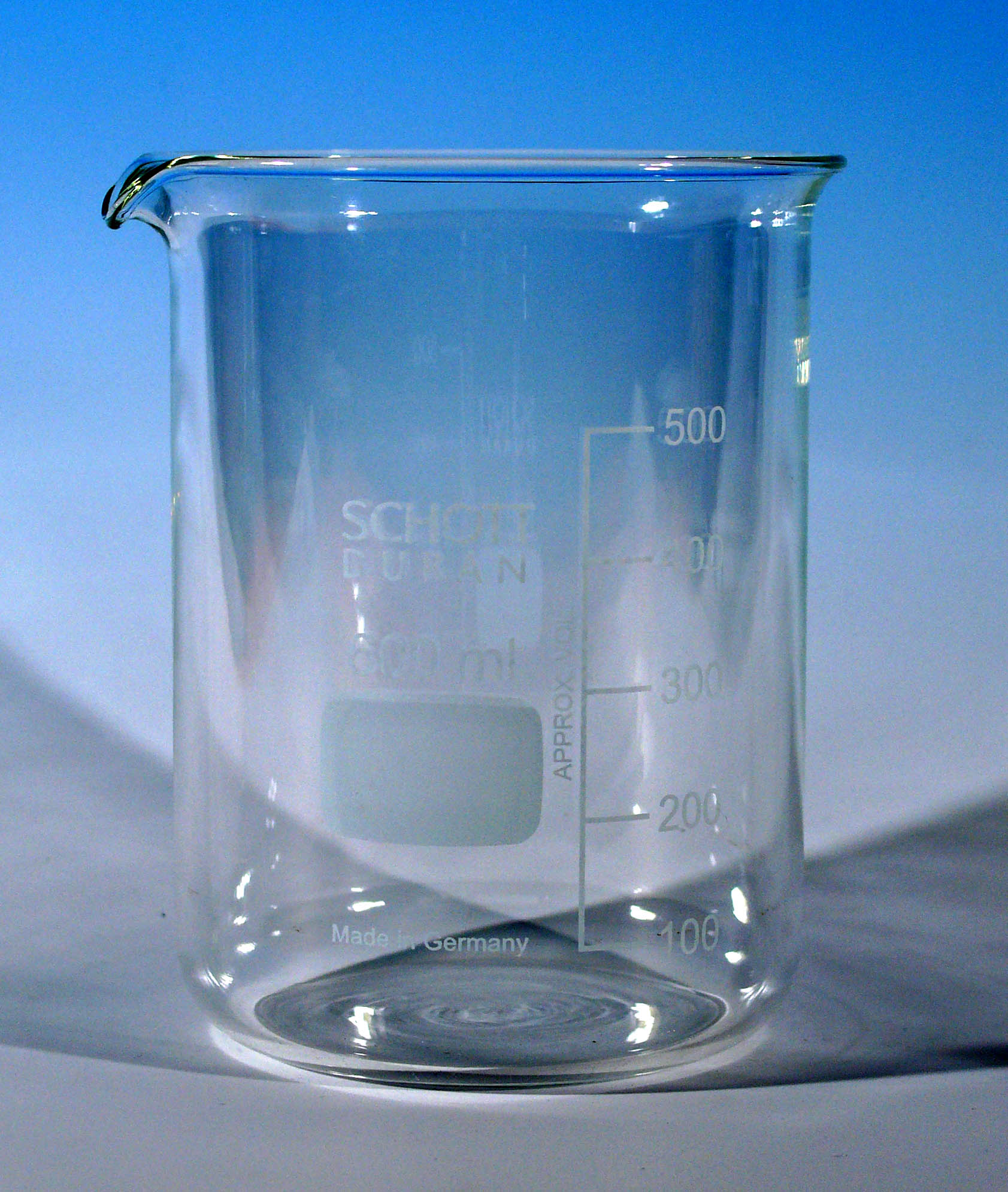 Beaker